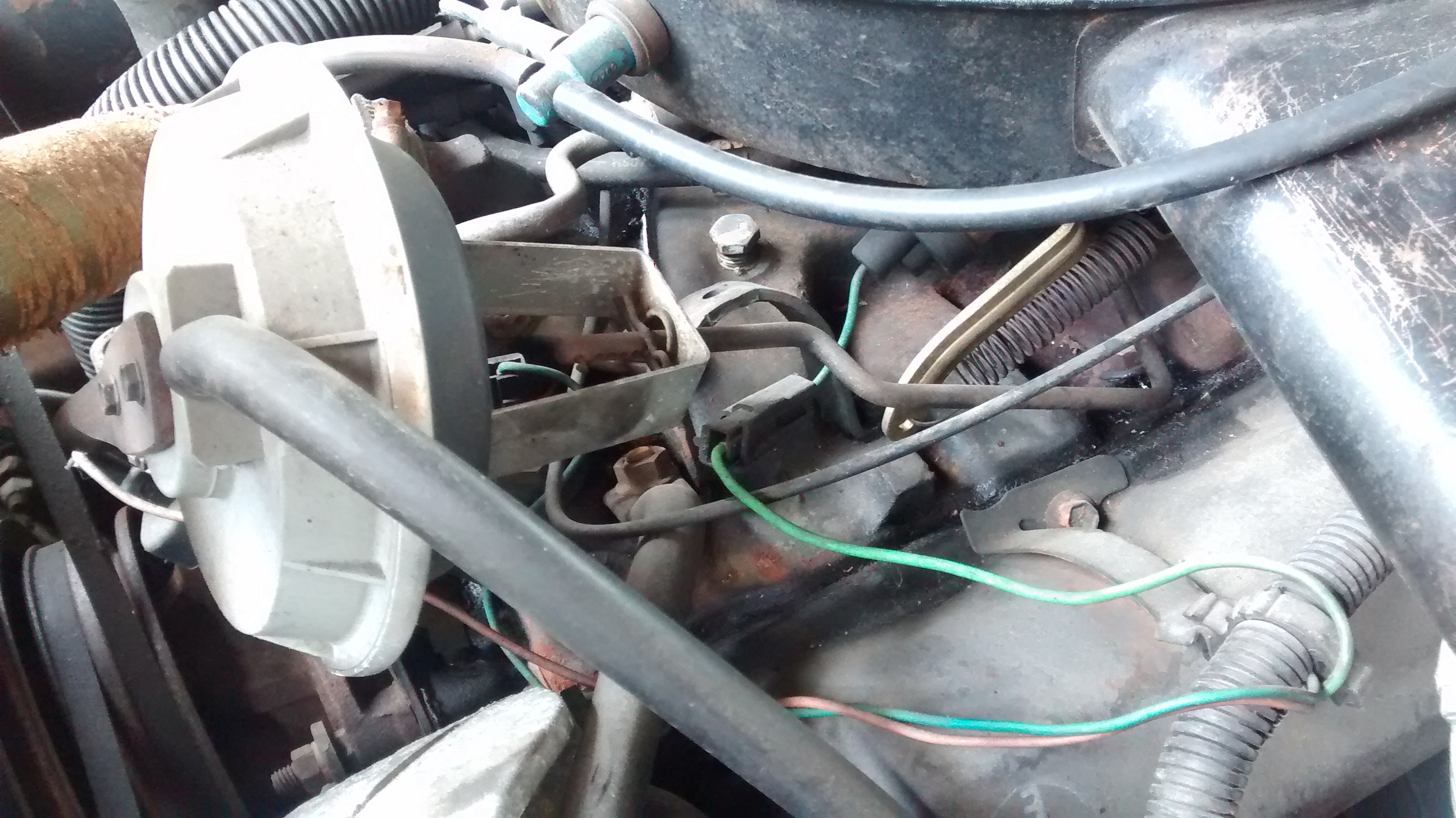 GM Tempomat Geber